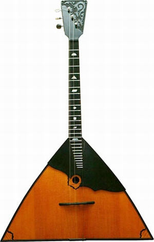 Балалайка-прима